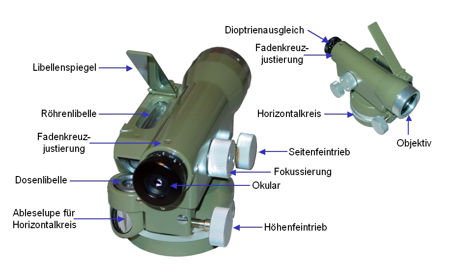 Einfaches Libellennivellier mit Bezeichnungen